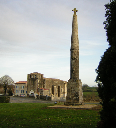 Croix hosannière de Saint-Christophe-sur-Roc Photographie prise le 9 janvier 2005 par Bernard Pithon. Image sous licence GFDL Bernard Pithon